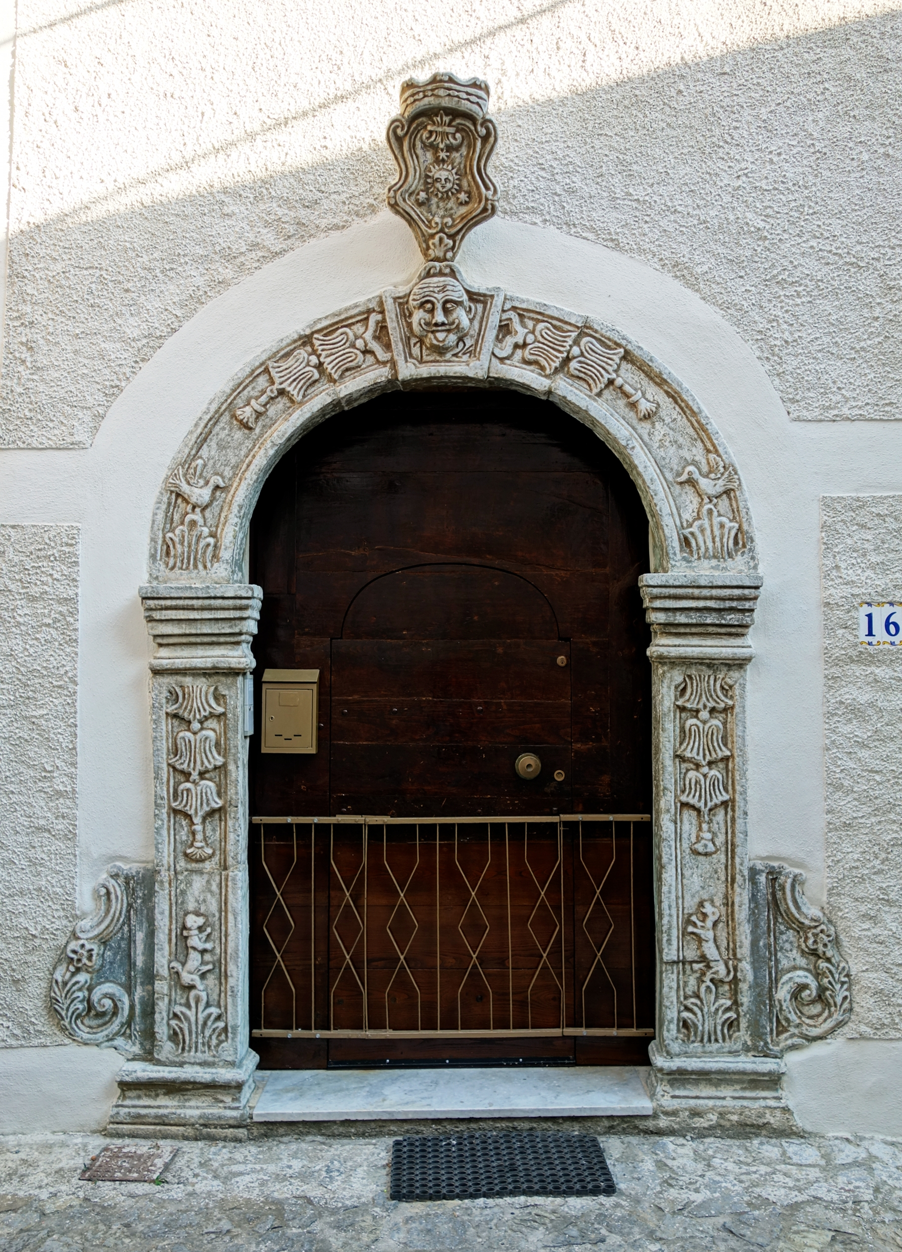 Porte à Scalea (Calabre).